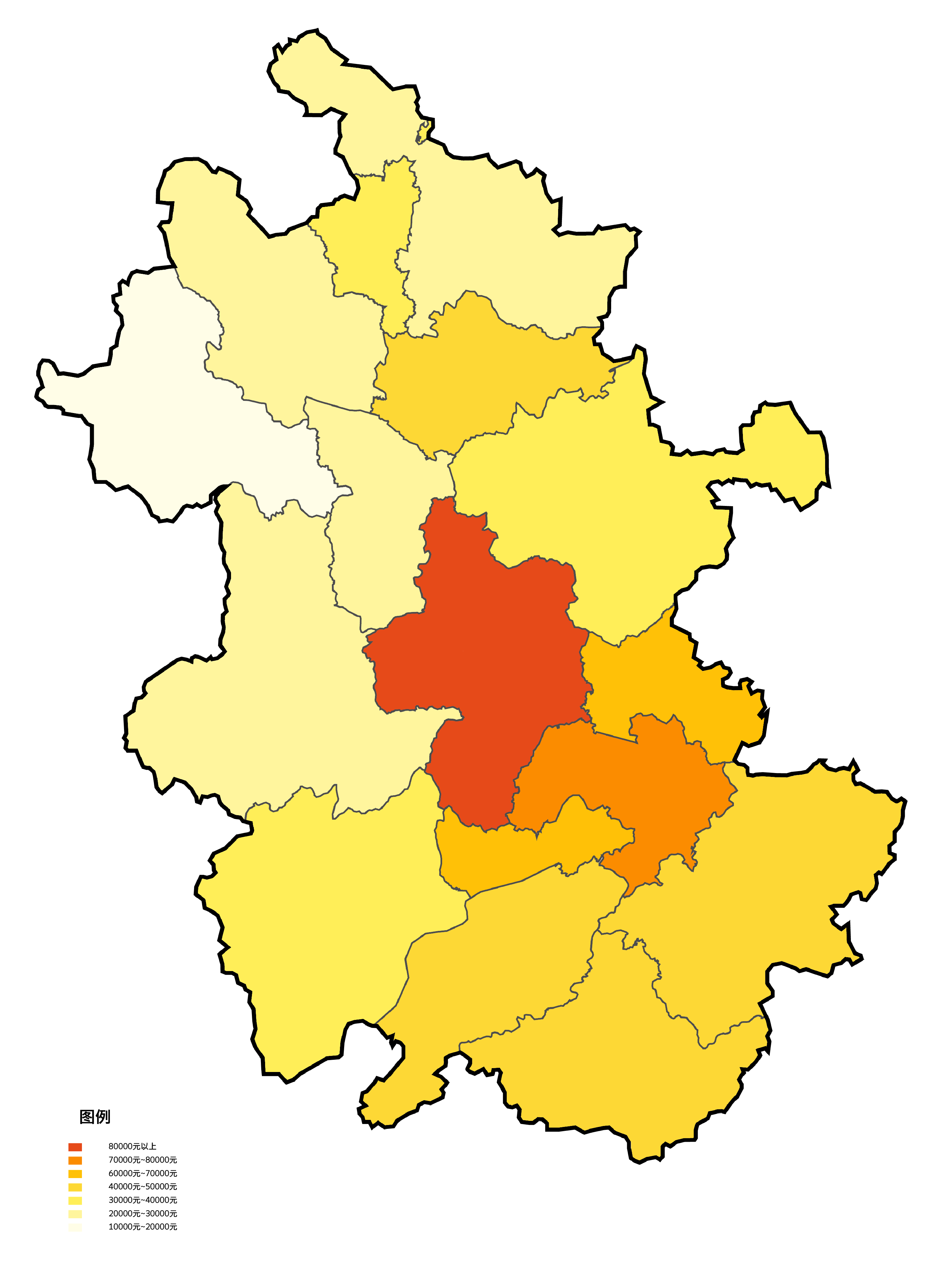 安徽省各地级市根据2016年人均地区生产总值填色地图